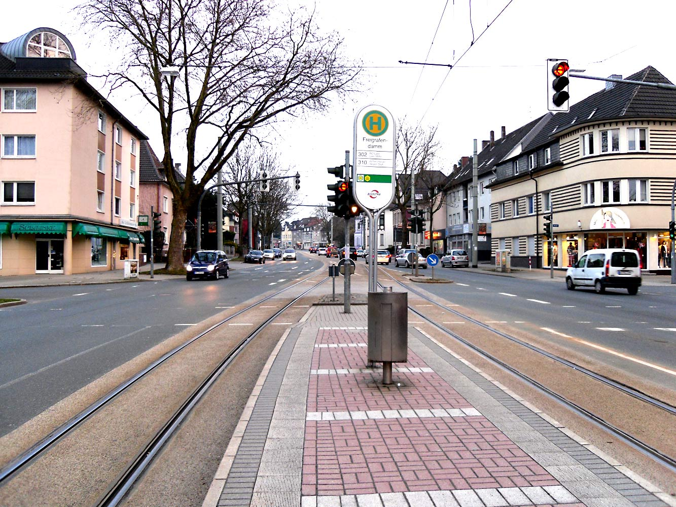 Bochum-Altenbochum. Die Straßenbannhaltestelle "Freigrafendamm" in der Wittener Str.